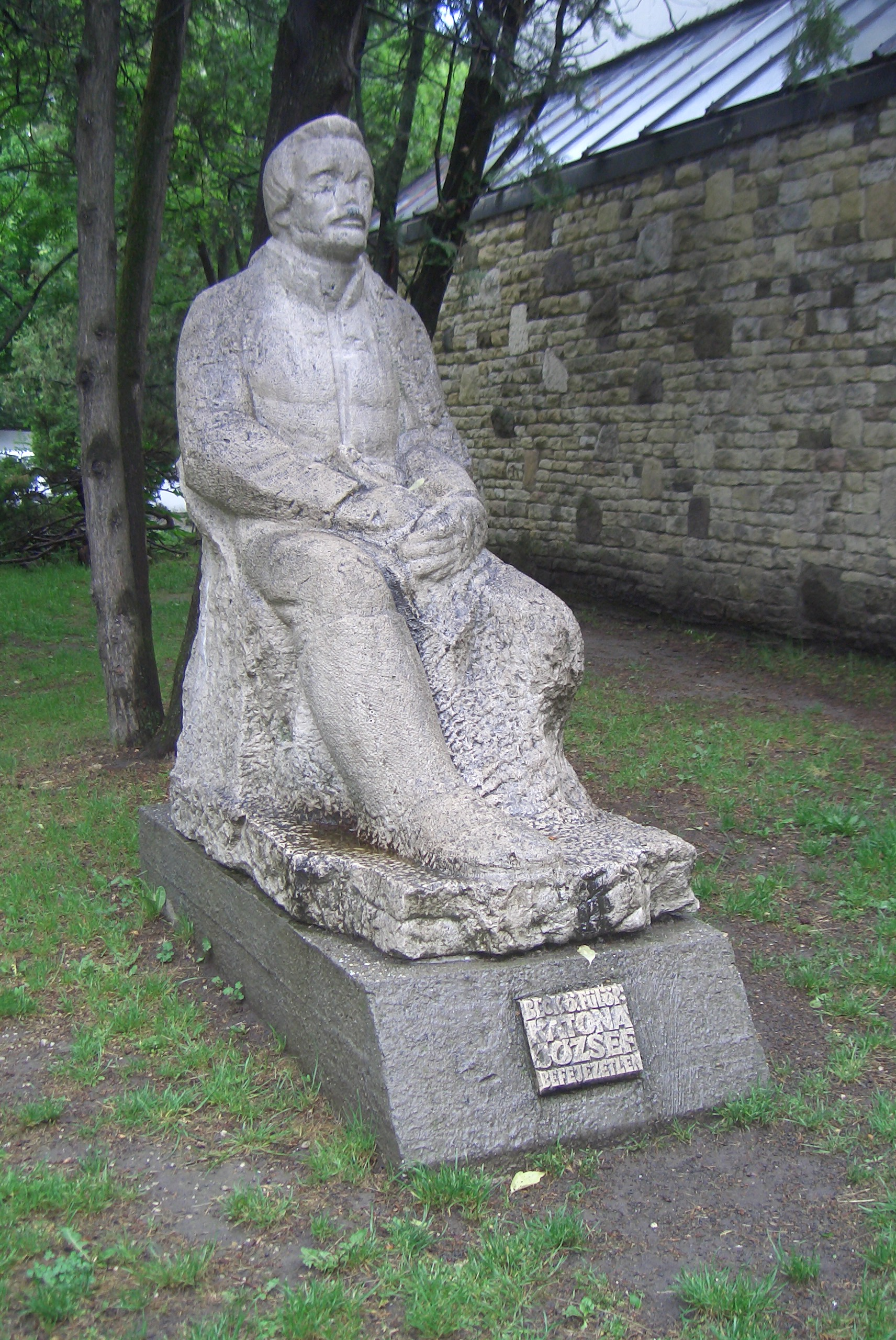 Skulptur von József Katona, unvollendetes Werk von Fülöp Beck Ö., in Szentendre